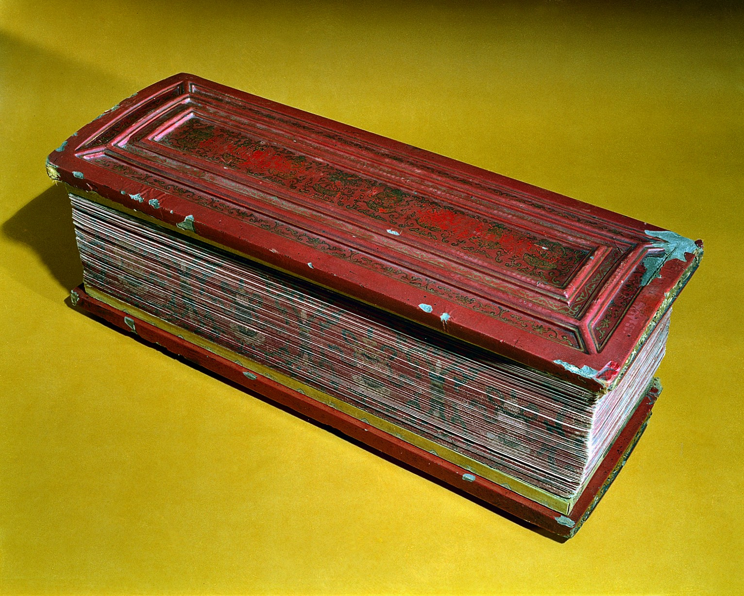 Wellcome Images